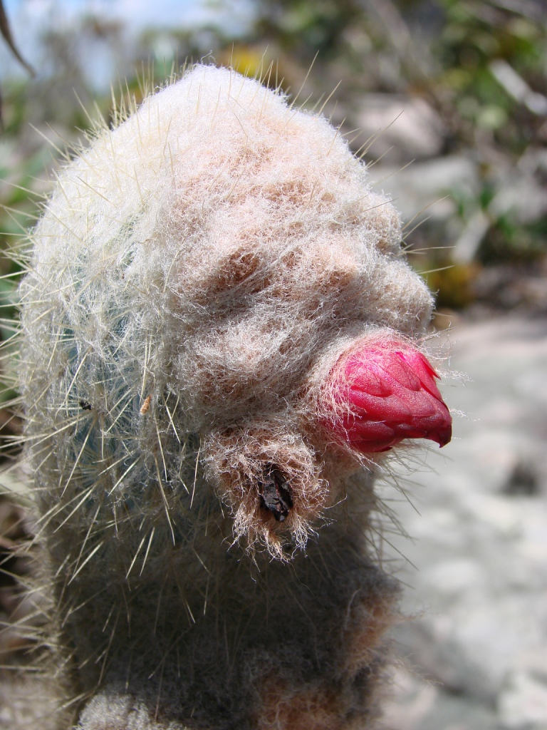 Micranthocereus purpureus CACTACEAE endêmica da Bahia - Chapada Diamantina. Parque Natural Municipal Morro do Pai Inácio - Palmeiras - Bahia - Brasil.